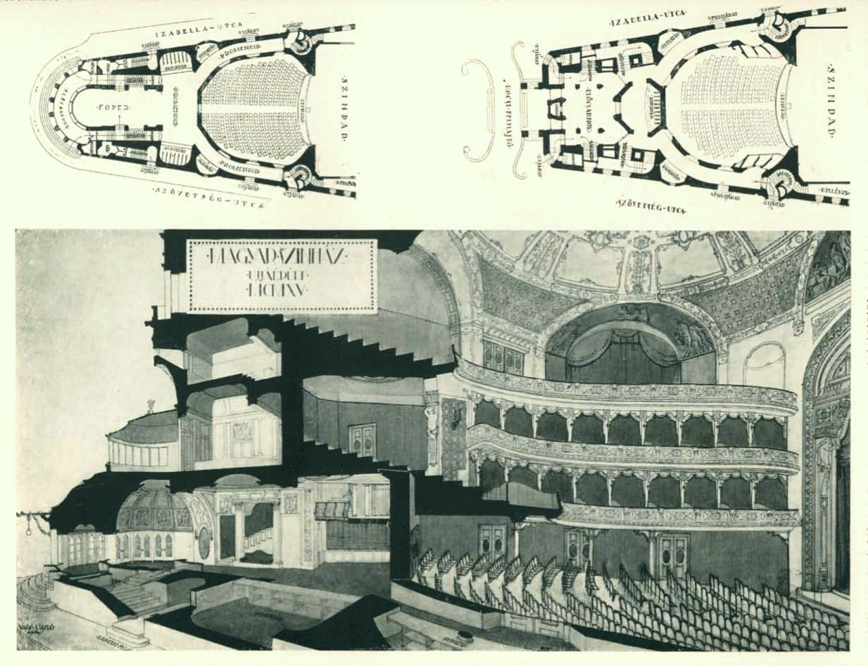 A budapesti Magyar Színház egy részének régi (fent jobbra) és Vágó László tervei szerint átalakított új (fent balra) alaprajza az átalakított rész metszetének távlati képével (lent)